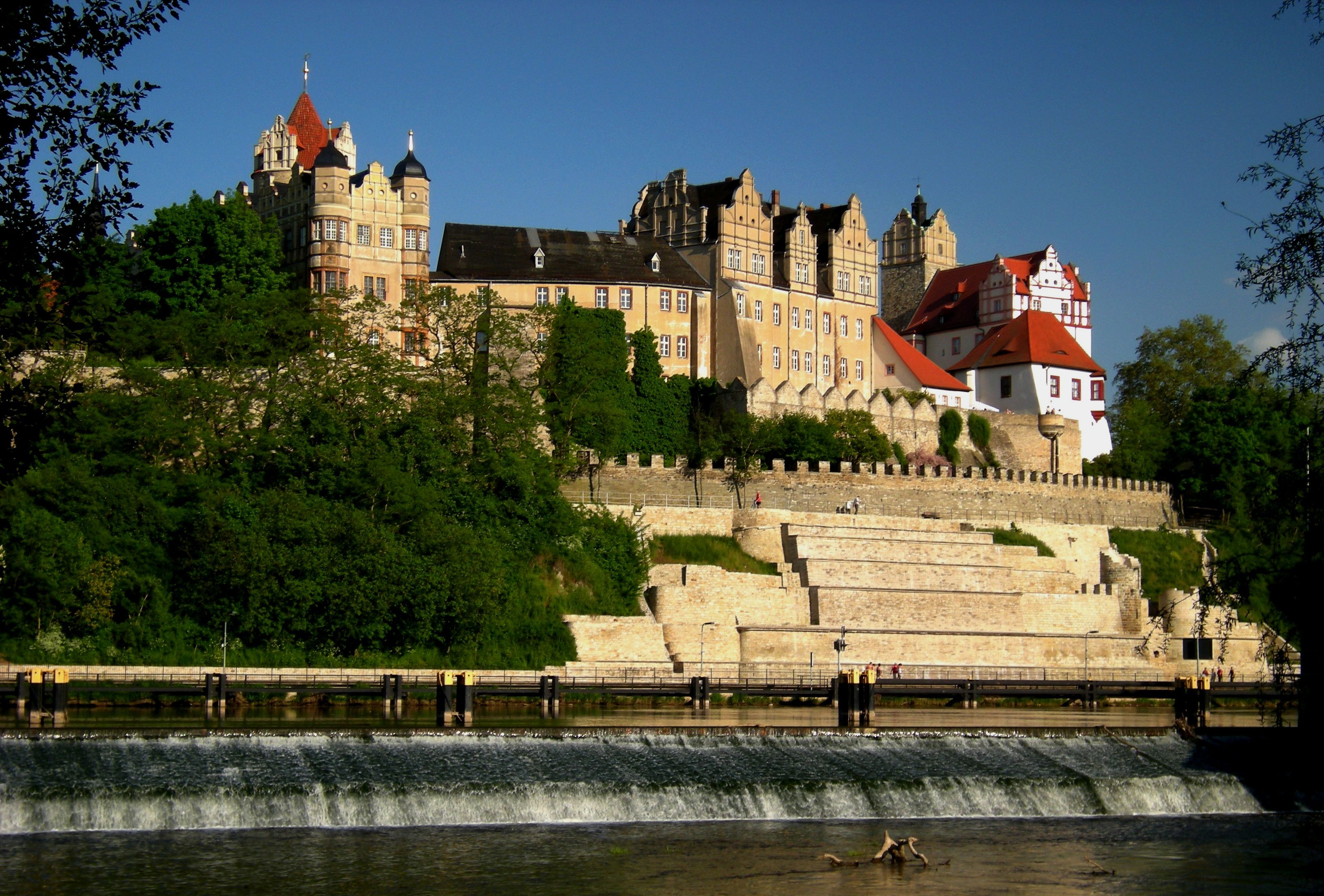 Bernburg-Schloß über der Saale_03.jpg